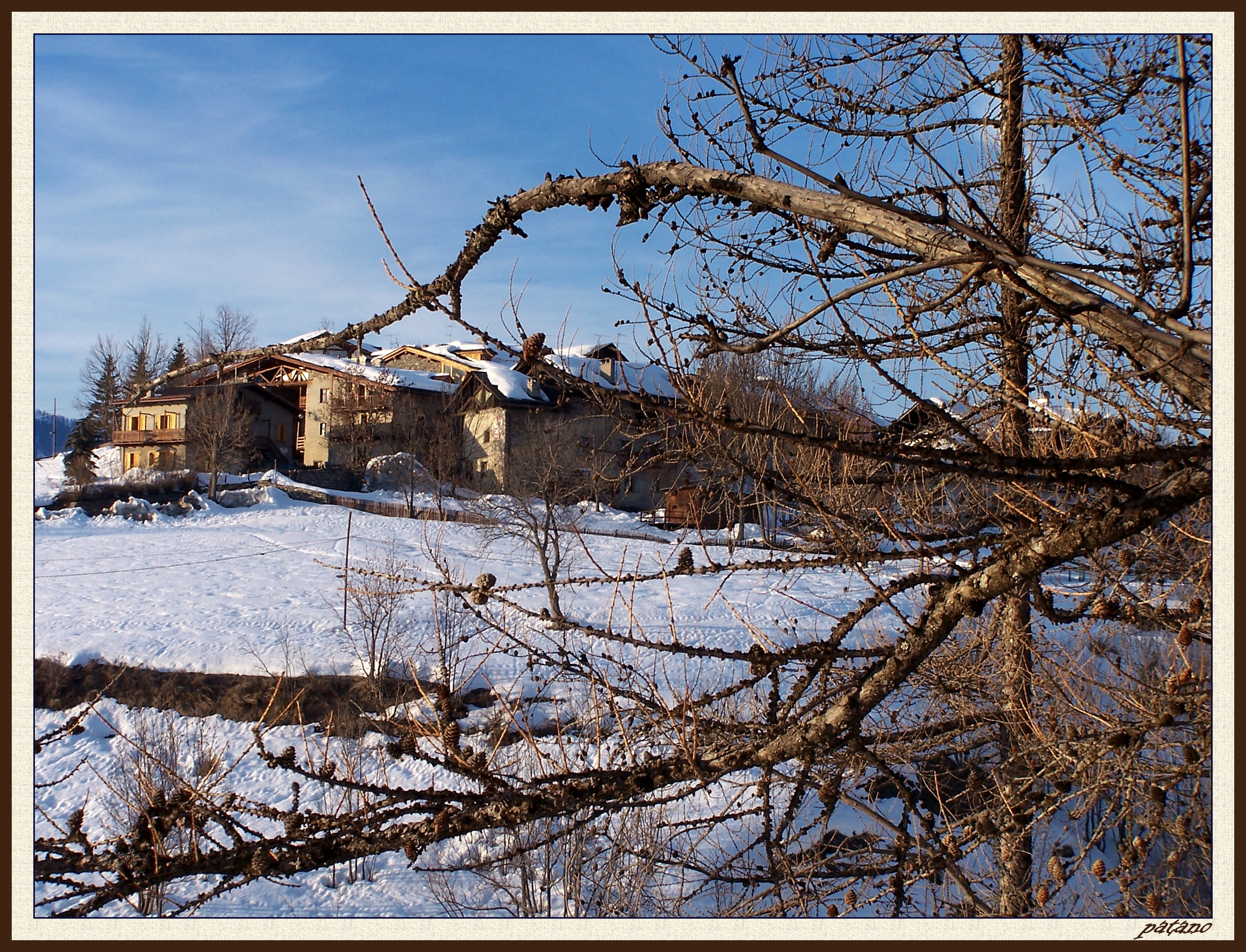 San Sicario